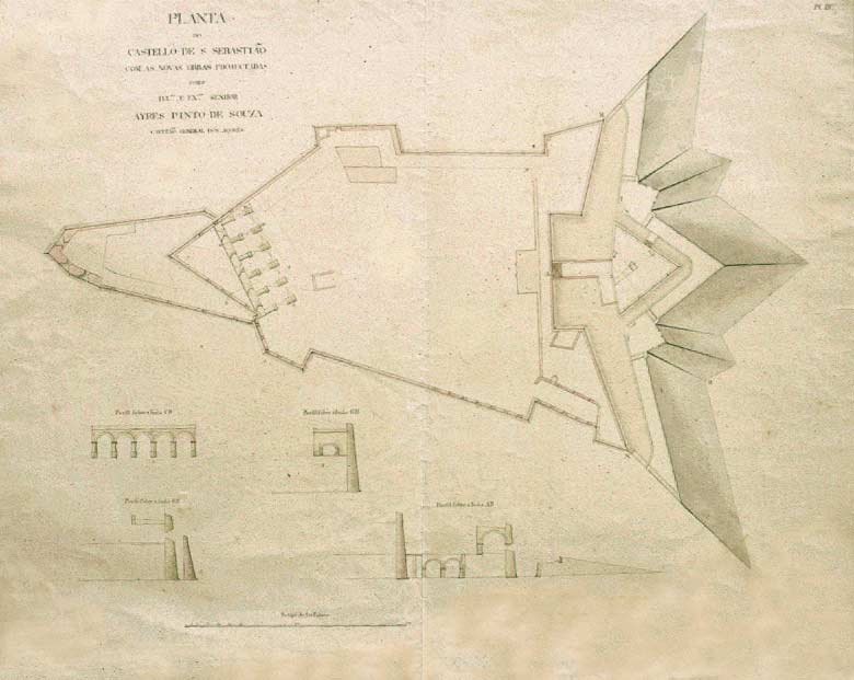 Planta do Forte de São Sebastião, freguesia de Nossa Senhora da Conceição, Angra do Heroísmo, ilha Terceira, Açores, Portugal.